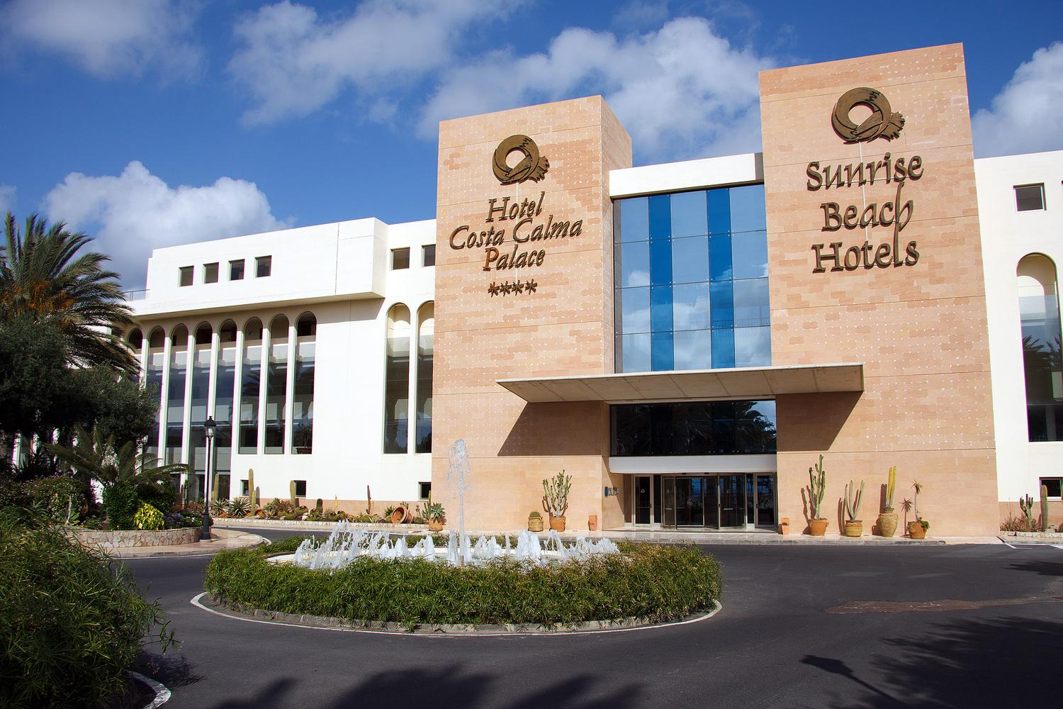 Hotel Costa Calma Palace, Fuerteventura, Kanarische Inseln, Spanien